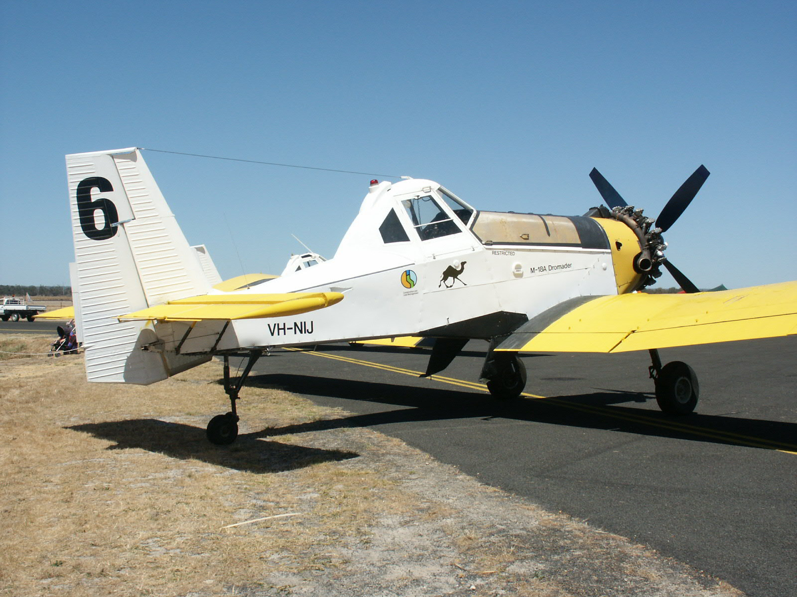 PZL-Mielec M-18 Dromader waterbomber, Busselton, Western Australia.